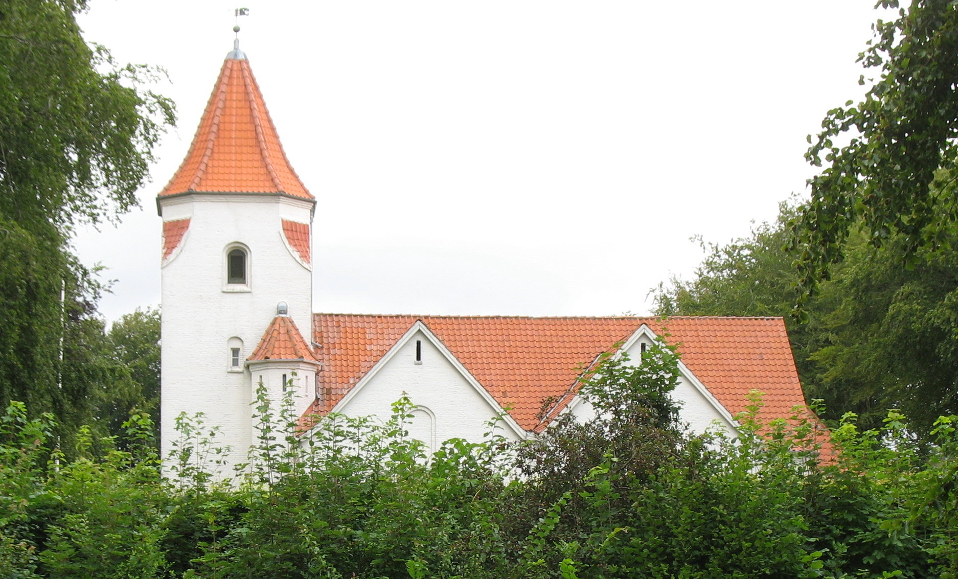 Rødding Frimenighedskirke fra 1909 af arkitekt Johannes Magdahl Nielsen